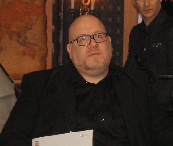 Mattias Bylund i BingoLotto-studion.